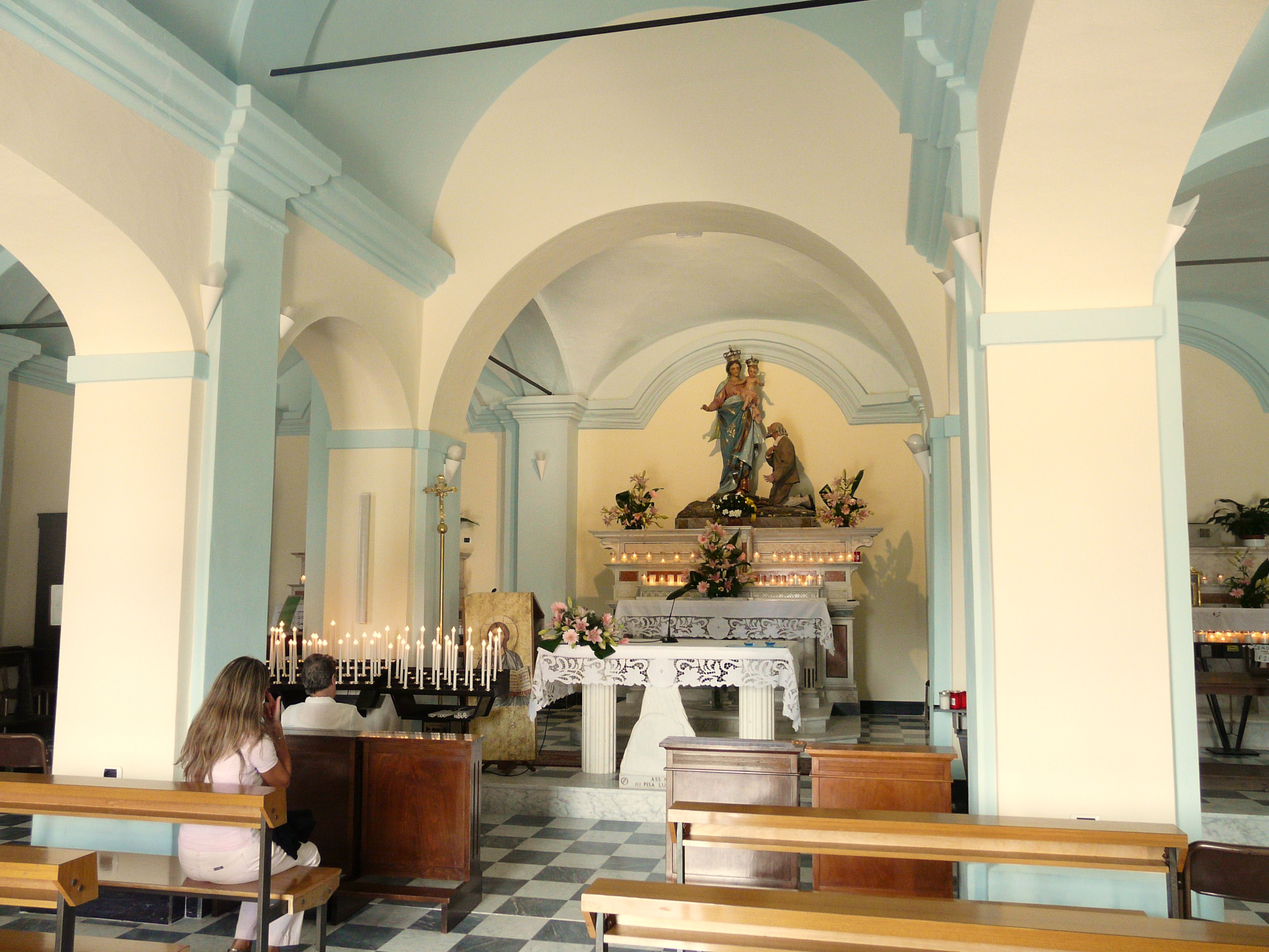 Interno del santuario di Nostra Signora della Guardia, Monte Argegna, Giuncugnano, Toscana, Italia